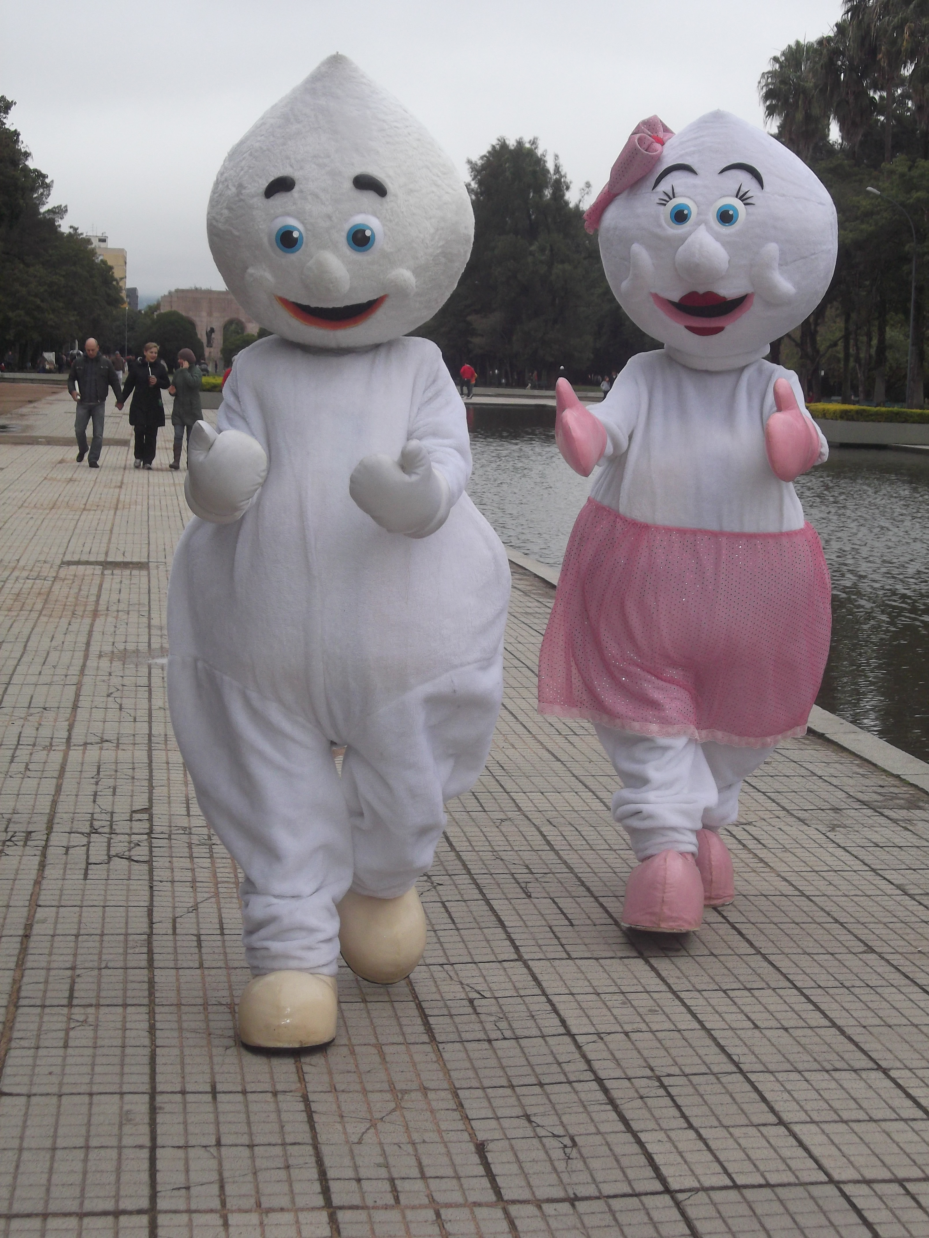 Se a Maria Gotinha está de saia o Zé Gotinha está